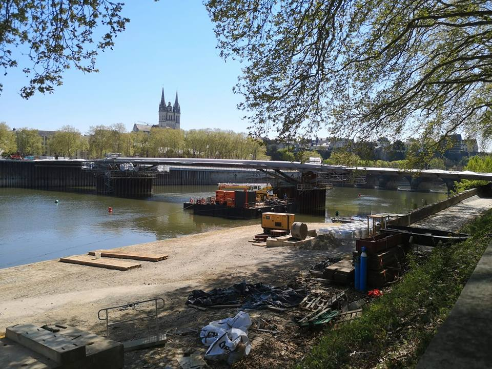 pont des arts et métiers avril 2019 pour le tramway